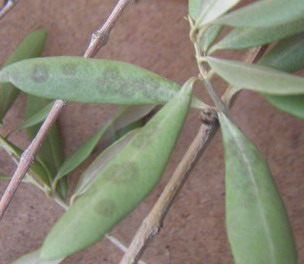 Foglie colpite da Spilocaea oleagina, foto propria scattata personalmente. Michele iannizzotto